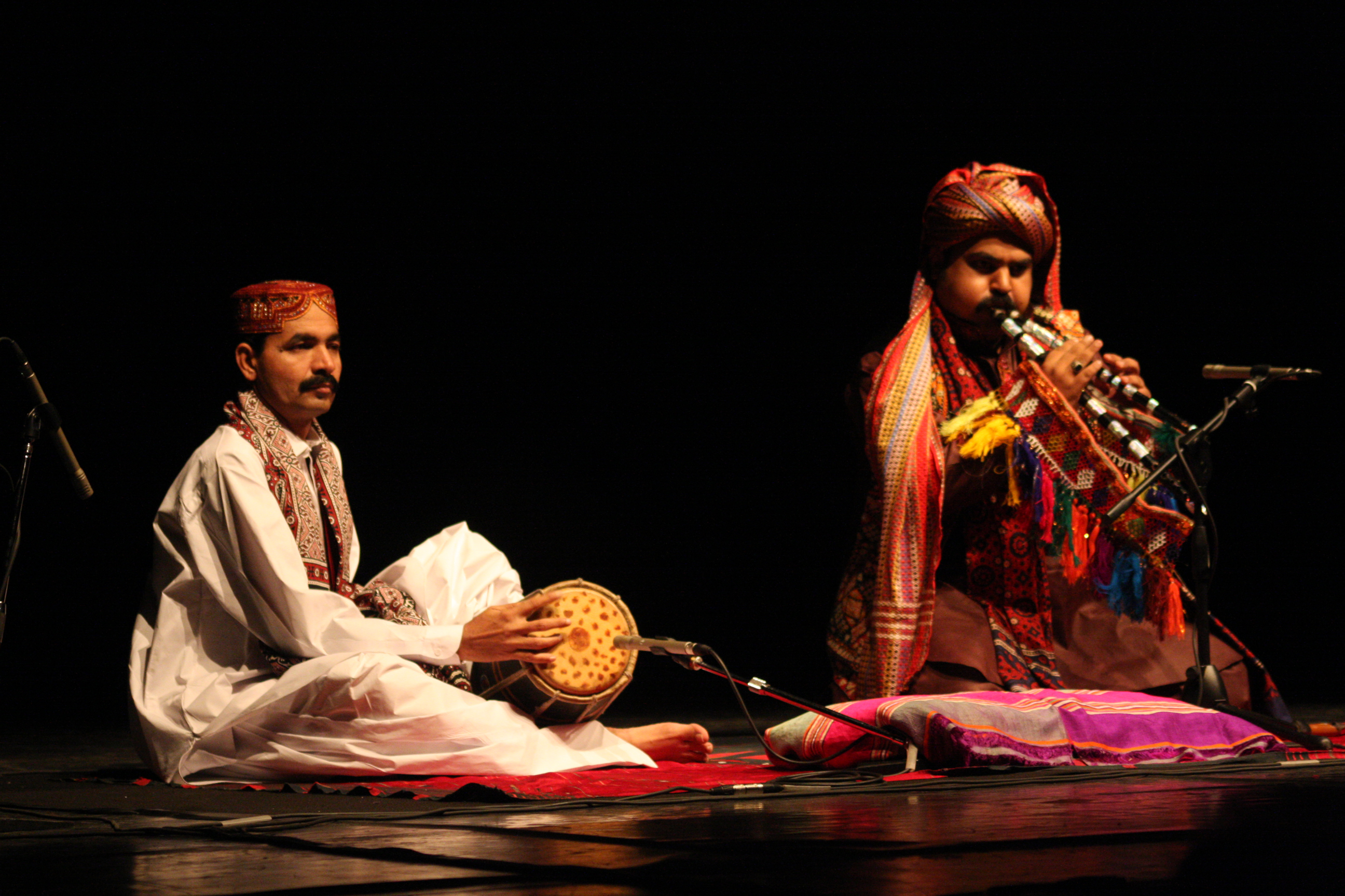 Piccolo Regio Giacomo Puccini, 8 settembre Il viaggio musicale dei Gitani Pakistan - Afghanistan: dal Pakistan alle montagne afghane